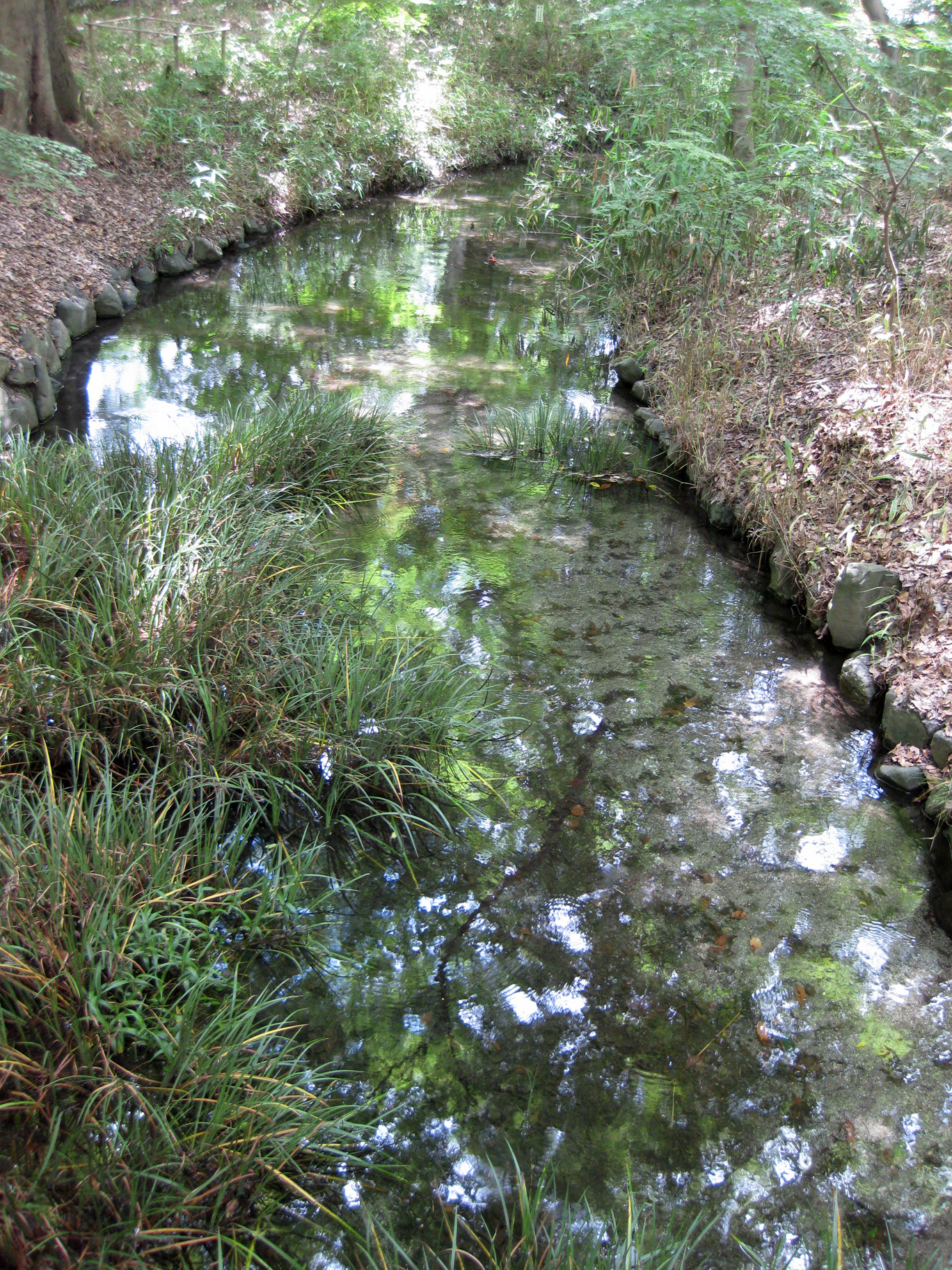 Tadasu_no_mori ("糺の森") Semi_no_ogawa ("瀬見の小川") in Shimogamo Jinja ("賀茂御祖神社（下鴨神社）"), Kyoto Pref. Japan.